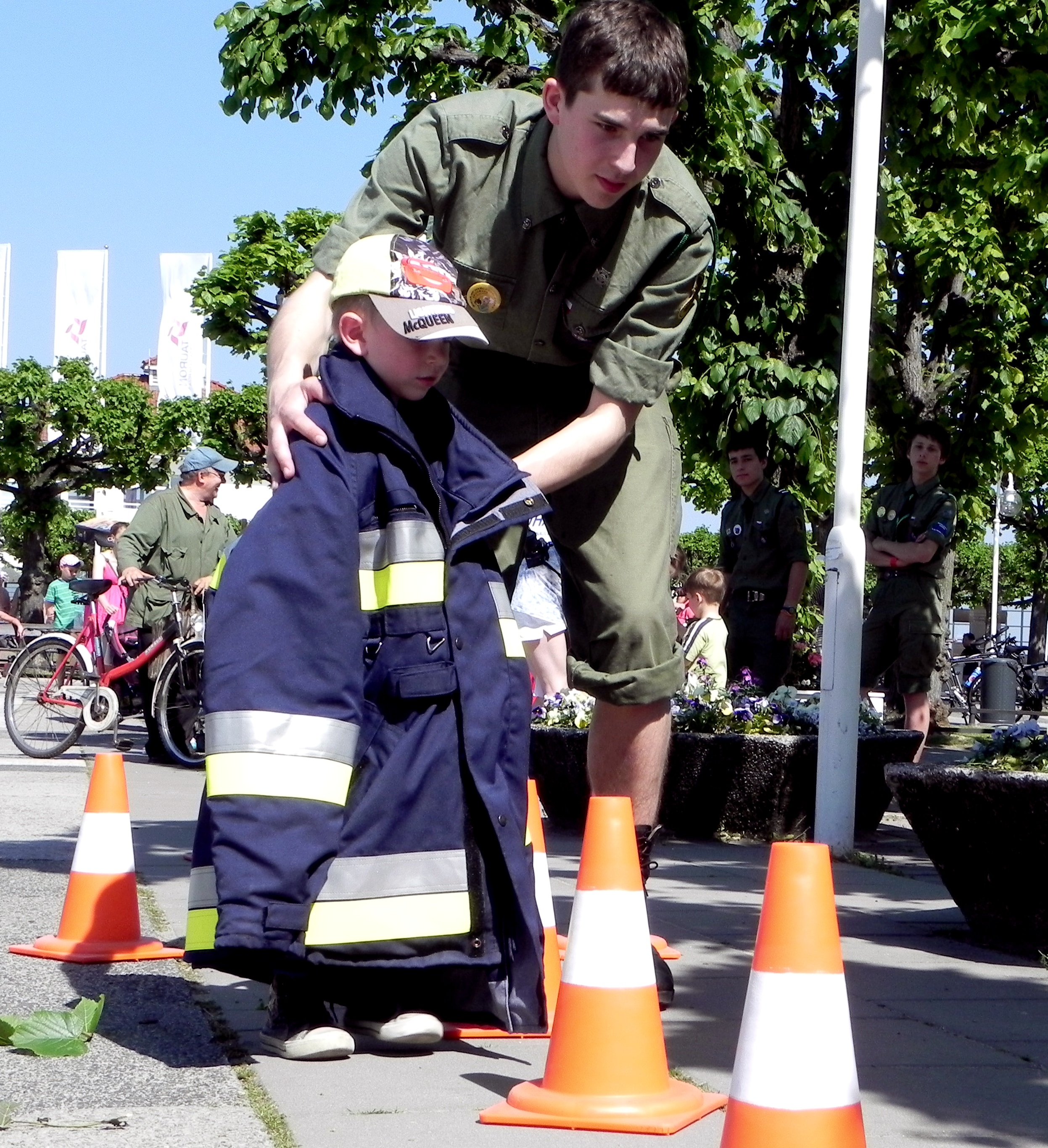 Tor przeszkód